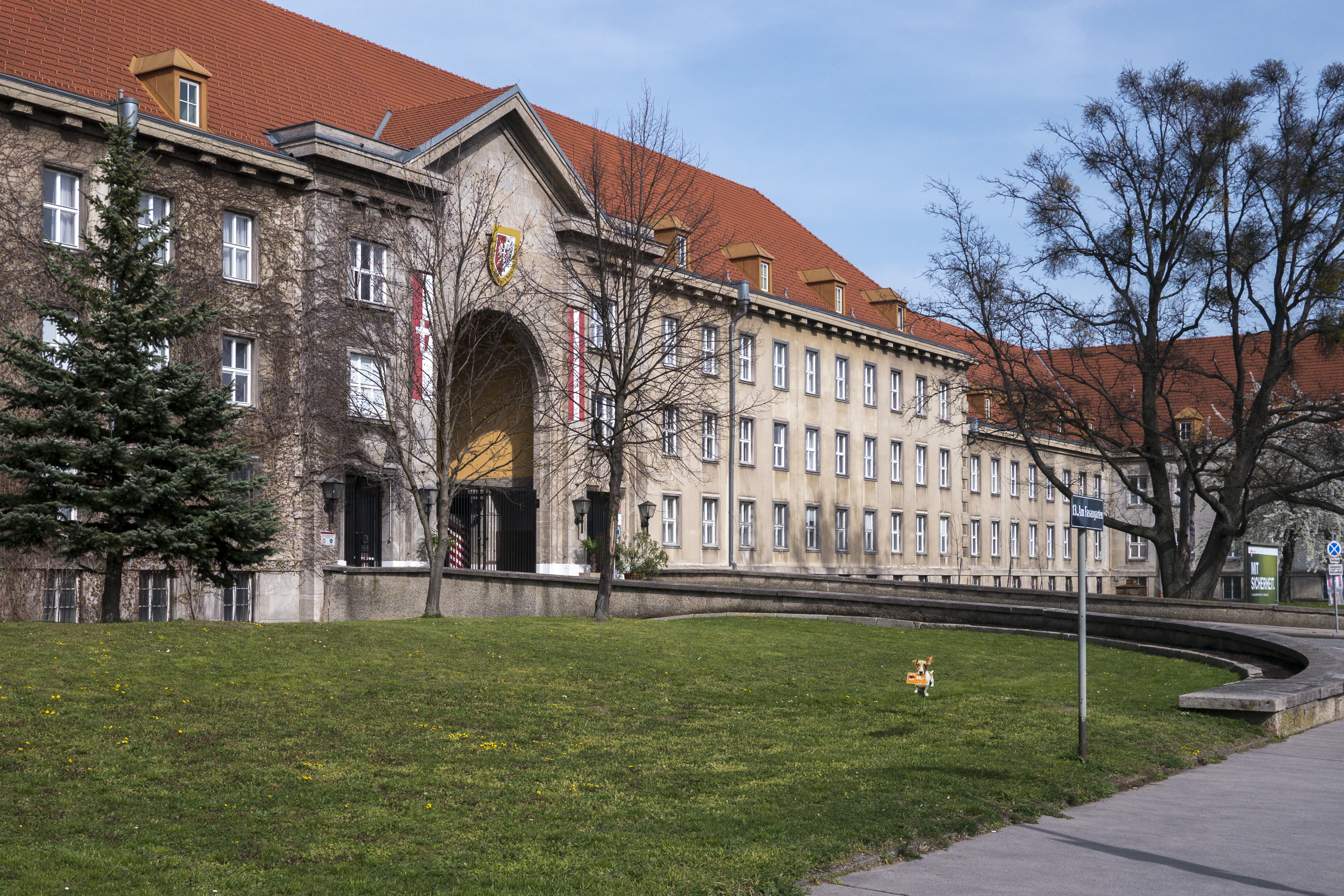 Maria-Theresienkaserne